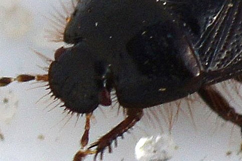 Borstelige doornwants